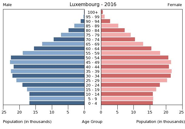 A population pyramid illustrates the age and sex structure of a country's population and may provide insights about political and social stability, as well as economic development. The population is distributed along the horizontal axis, with males shown on the left and females on the right. The male and female populations are broken down into 5-year age groups represented as horizontal bars along the vertical axis, with the youngest age groups at the bottom and the oldest at the top. The shape of the population pyramid gradually evolves over time based on fertility, mortality, and international migration trends.